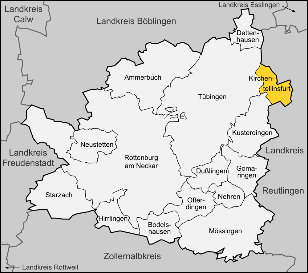 Karte der Gemeinde Kirchentellinsfurt im Landkreis Tübingen